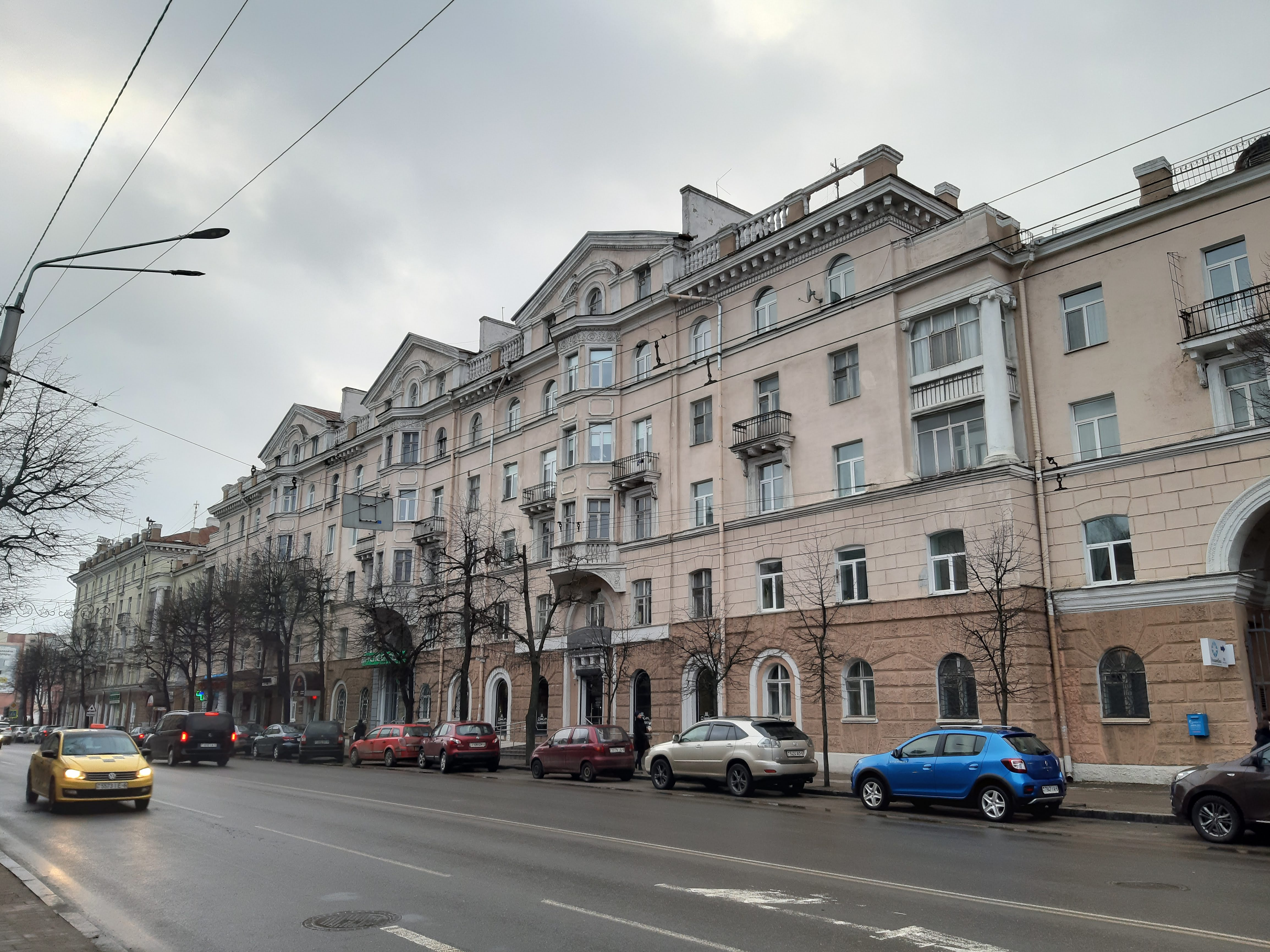 Магілёў у 2019 г